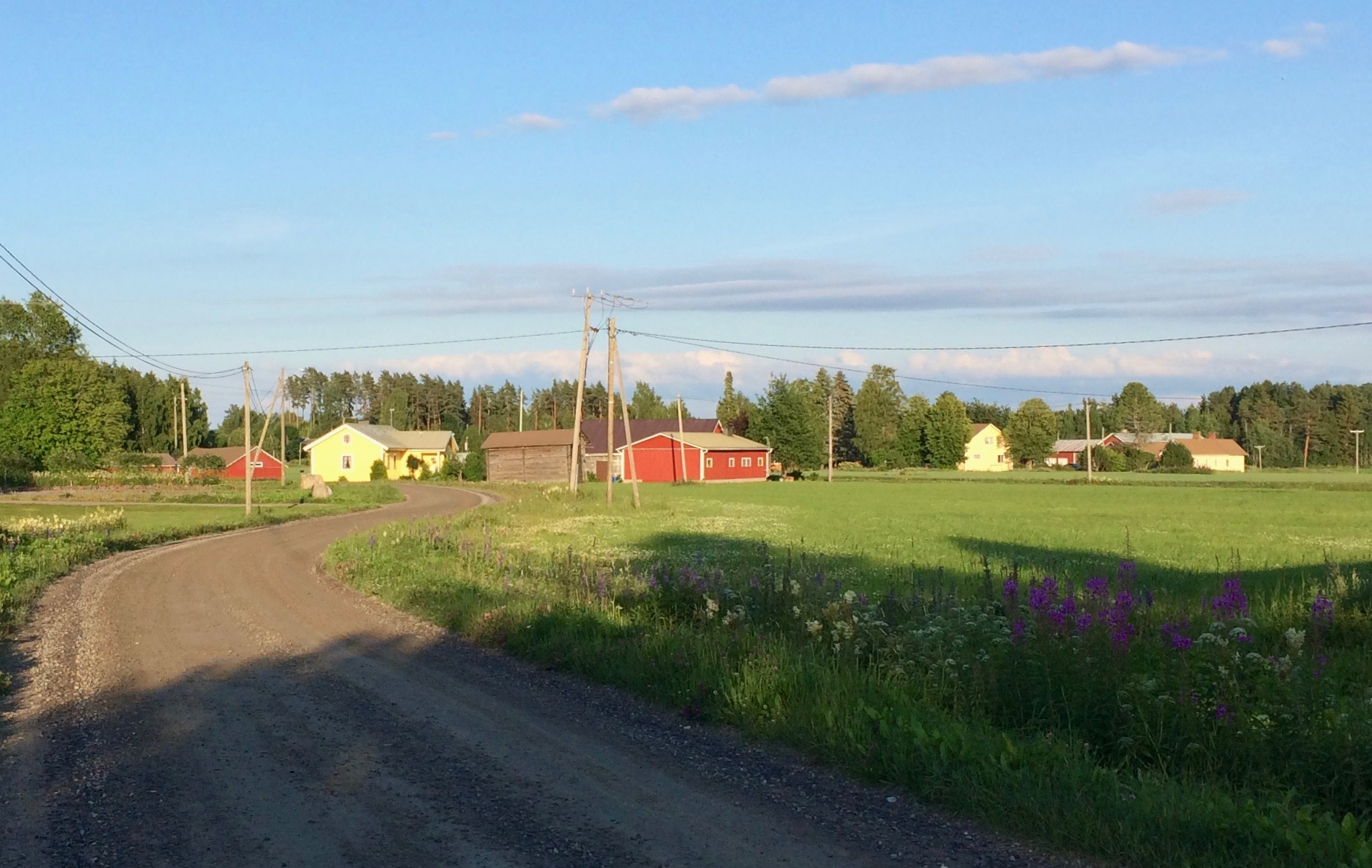 Tuuloksen Sydänmaan kylää Sydänmaantien varrella.